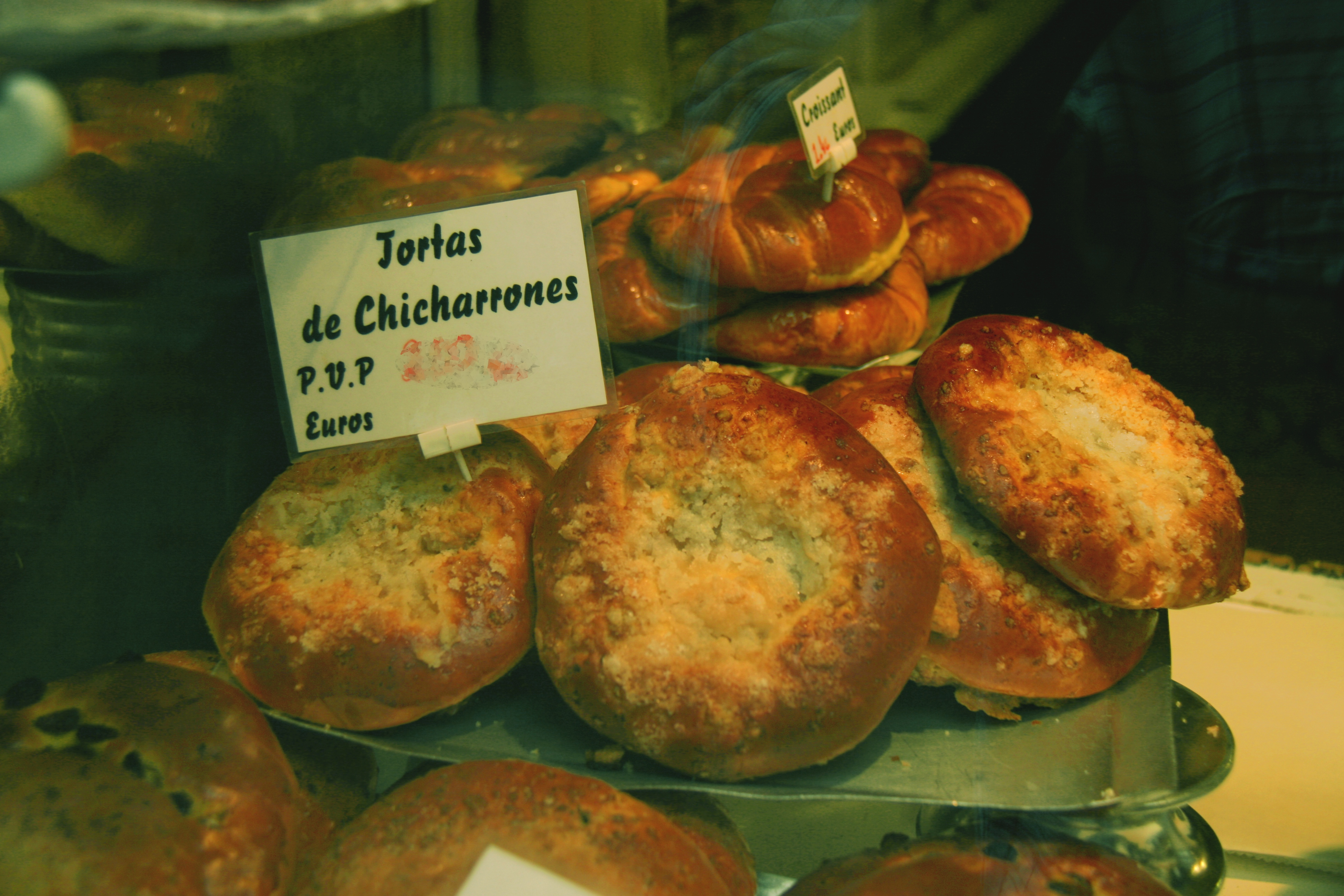 Tortas de chicharrones. Los chicharrones son los trozos que quedan al derretir la grasa del cerdo para hacer la manteca, fritos después en esta grasa y de venta en carnicerías